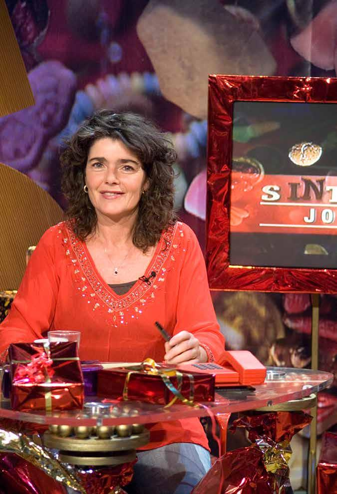 Het Sinterklaasjournaal gepresenteerd door Dieuwertje Blok